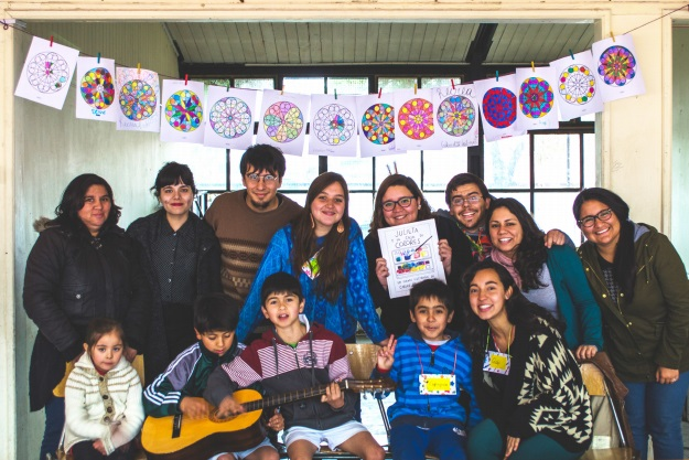 Sesion de Mandalas, Recrea. Fotografía por Constanza Navarro.